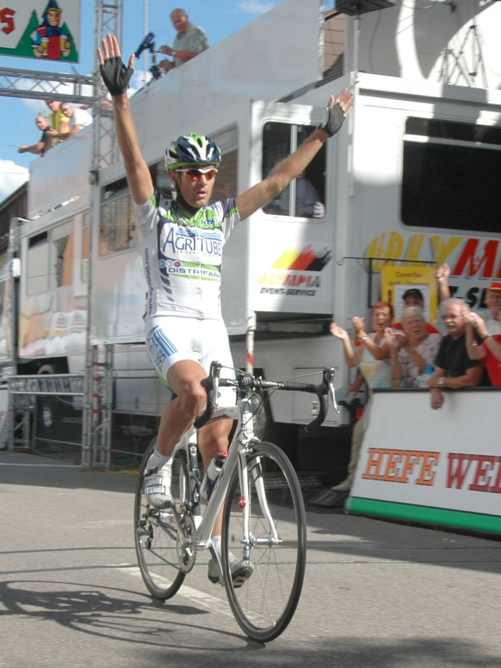 Beschreibung: Der Spanier Moises Duenas Nevado vom französischen Continental Pro Team Agritubel gewinnt die zweite, so genannte Markgräflerland-Etappe der Rothaus Regio-Tour International 2007 von Müllheim (Baden) nach Neuenburg am Rhein. Er legte damit den Grundstein für den Gesamtsieg bei der Regio-Tour 2007. Quelle: selbst fotografiert Datum: 23. August 2007 Ort: Neuenburg am Rhein, Baden-Württemberg, Deutschland Fotograf oder Zeichner: Alex Alex (de) Kamera: Nikon D 70 Software: The GIMP Andere Versionen: Lizenzstatus: GNU FDL